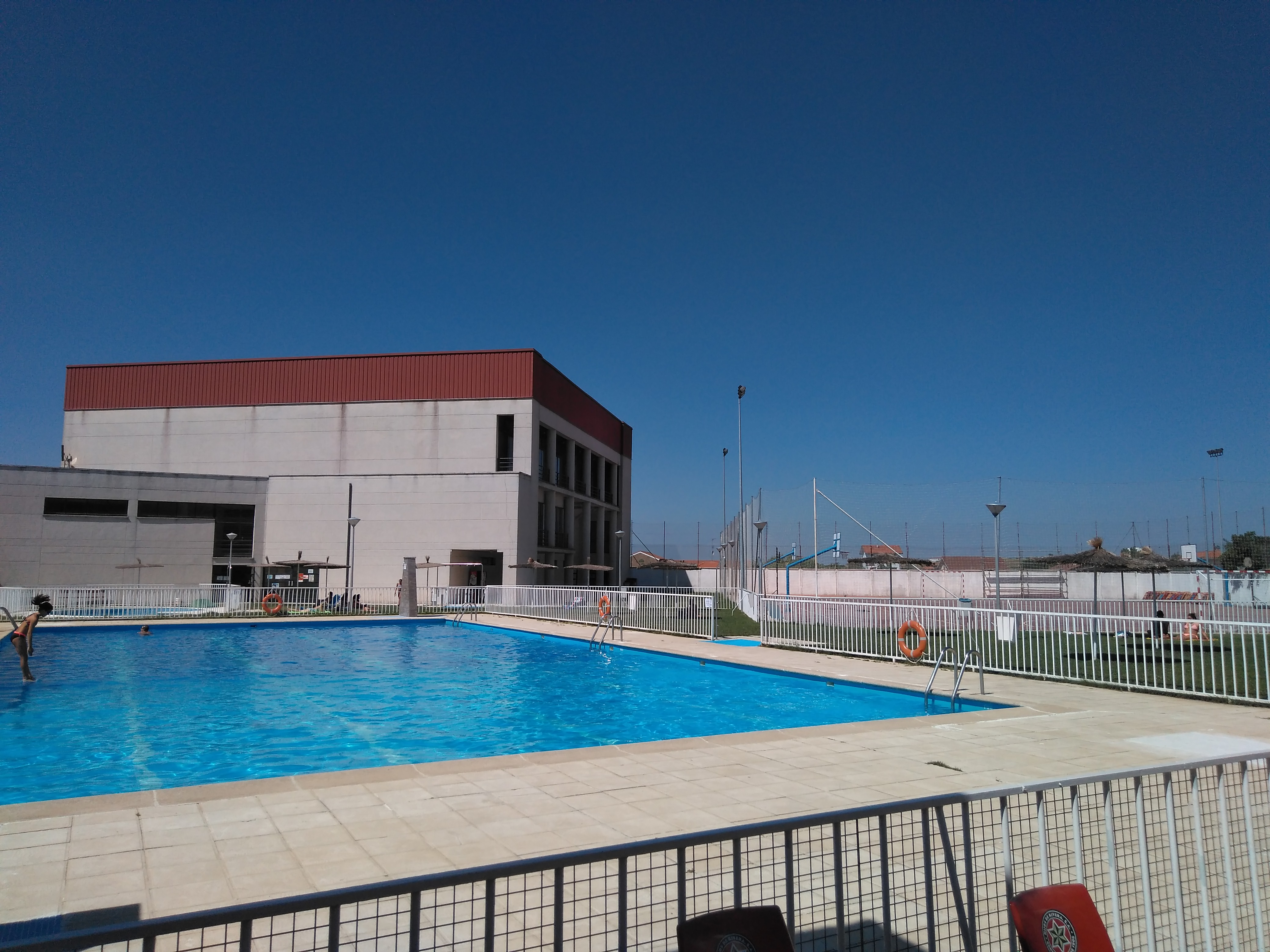 instalaciones polideportivas de Aldeadávila (Salamanca, España)